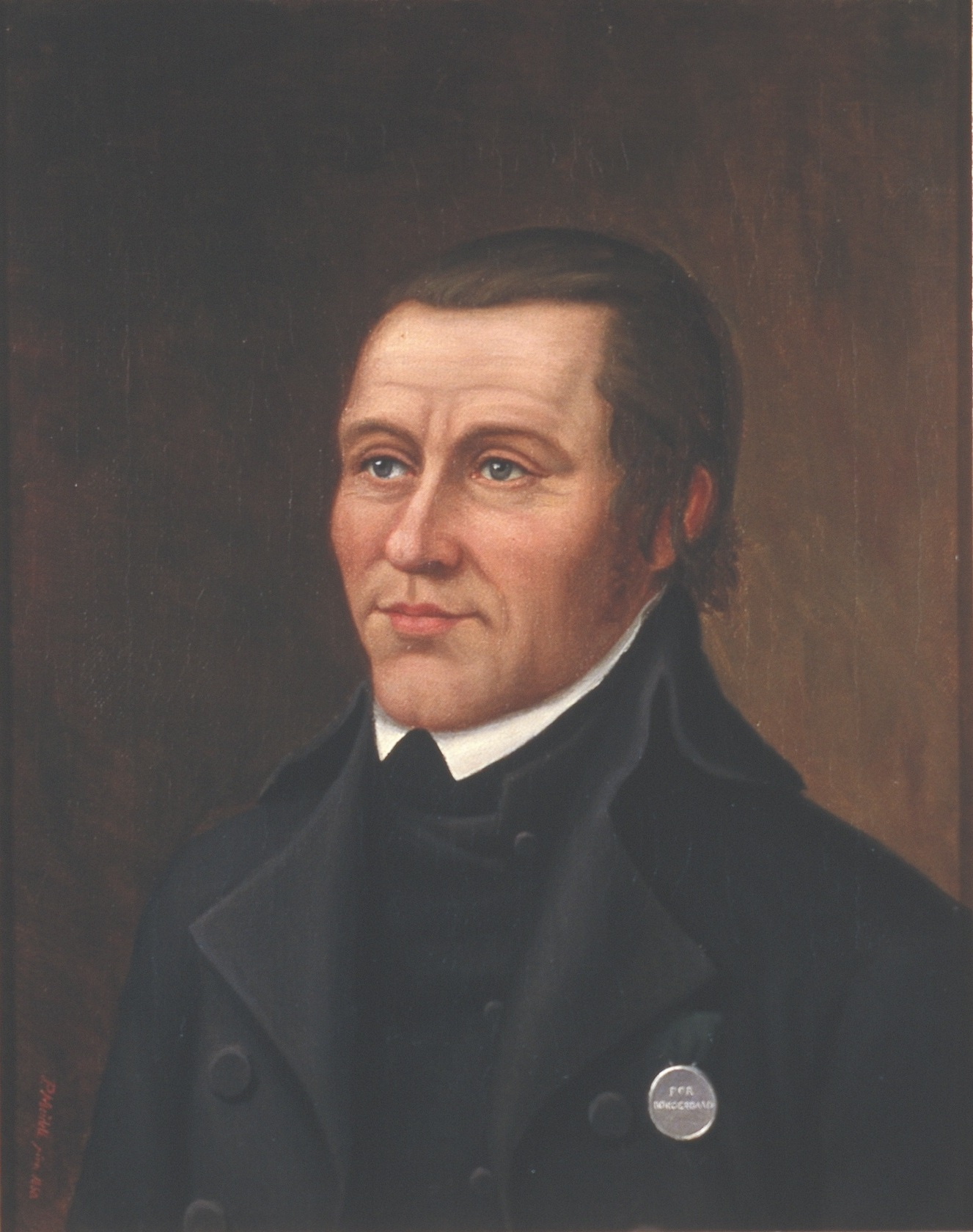 Sort jakke med borgerdådsmedalje i sølv og i grønt bånd.